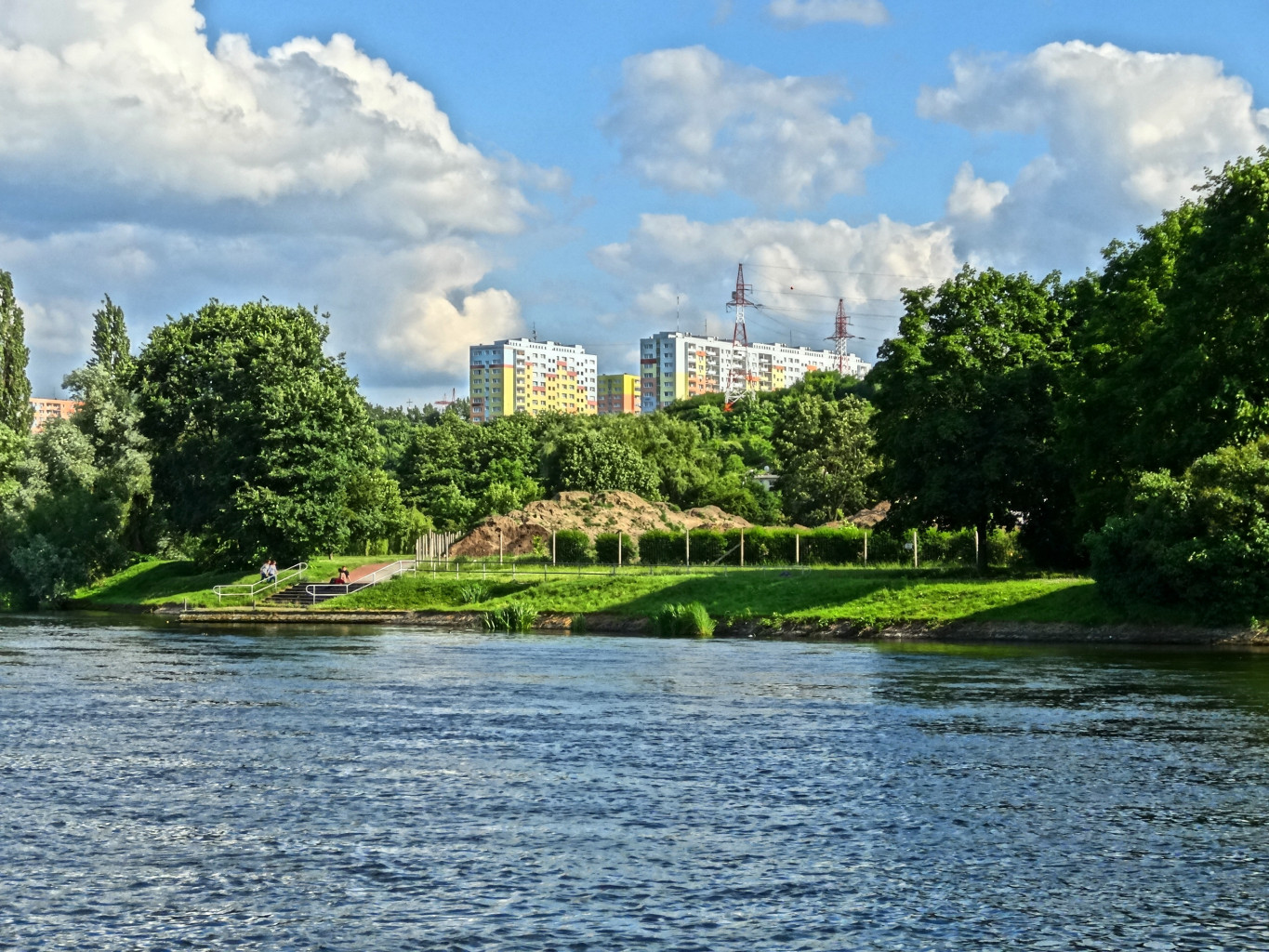 Zakole Brdy w Bydgoszczy koło hali widowiskowo-sportowej "Łuczniczka" w Bydgoszczy